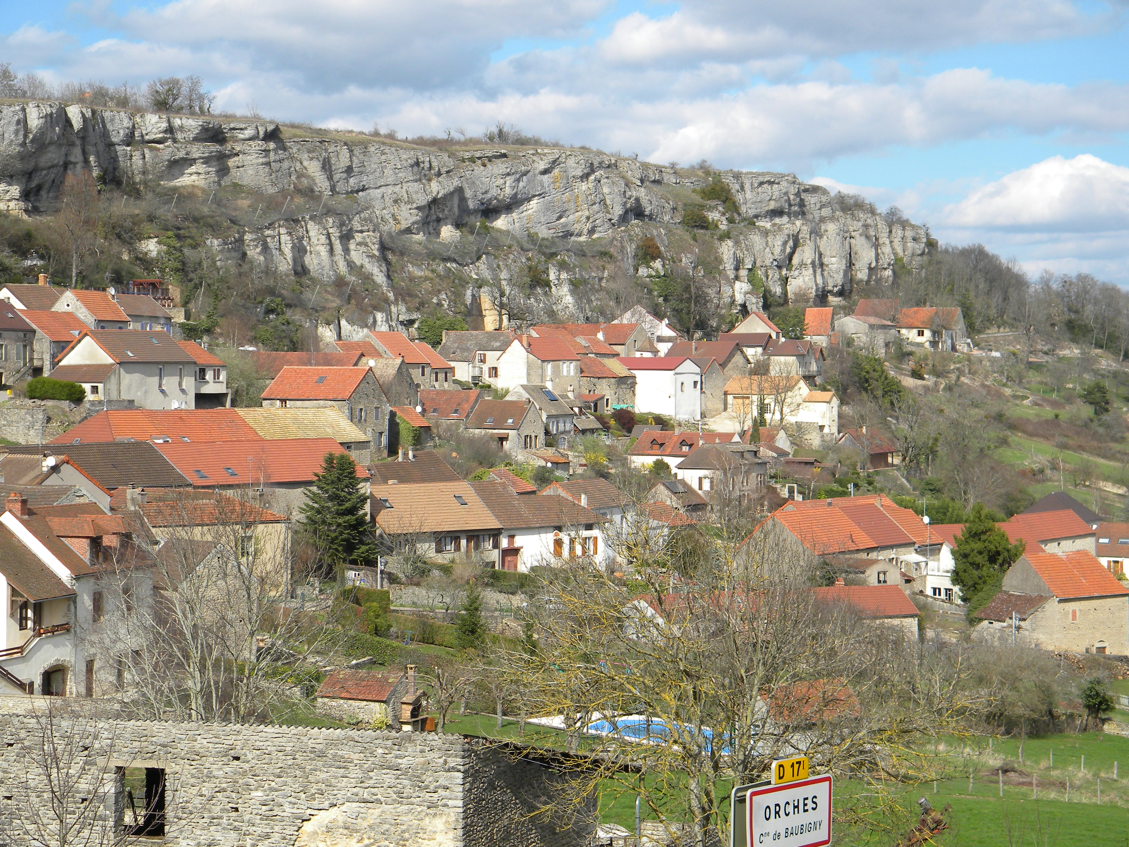 Orches